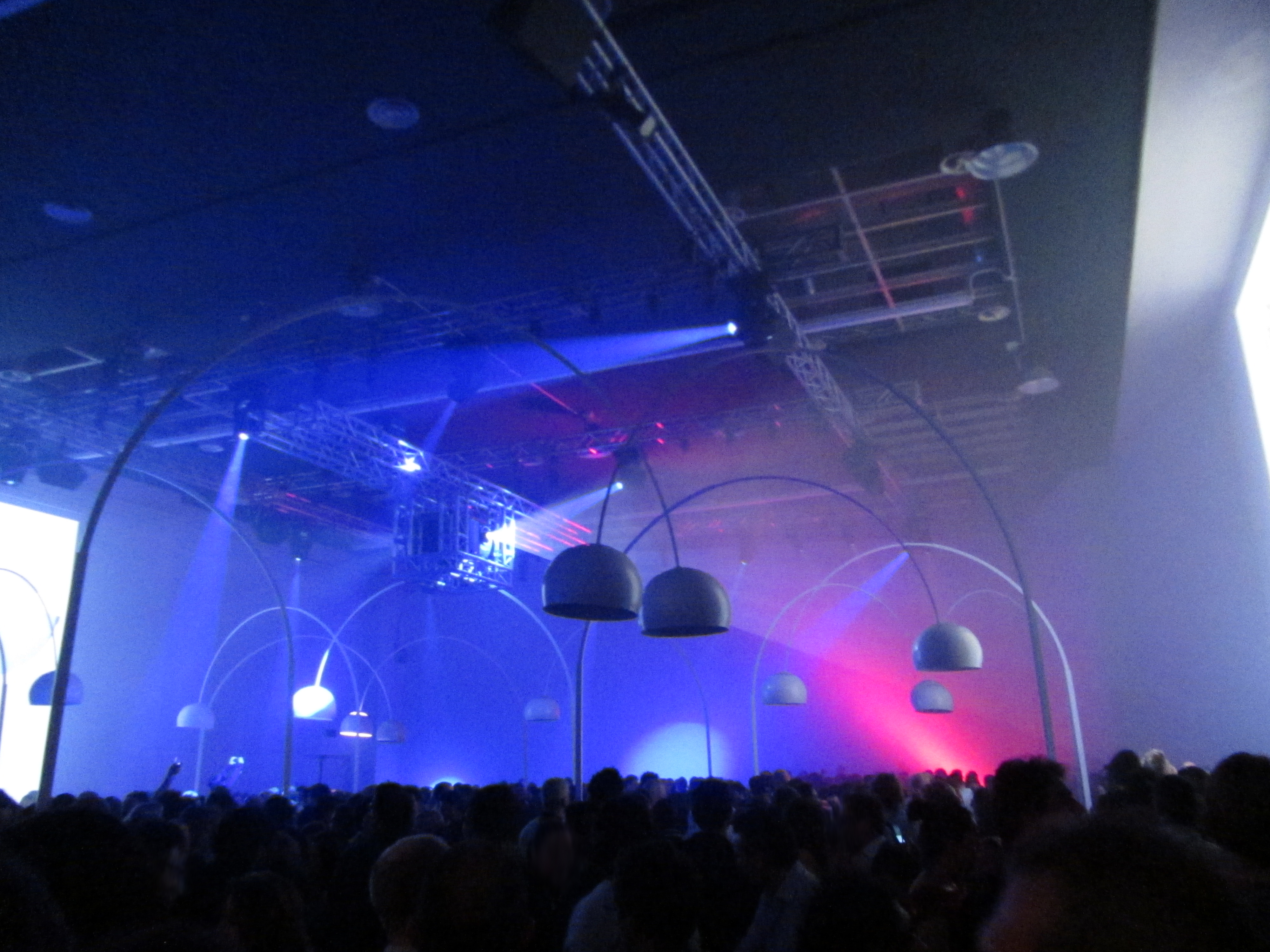 Festa dei 50 anni della FLOS Evento tenutosi durante il Fuorisalone 2012 (Milan Design Week) presso il Palazzo della Permanente a Milano in Italia. Evento chiuso (su invito) Open Bar, Dj set, catering ed esposizione di tutte le lampade FLOS (anche quelle fuori produzione) dal 1962 al 2012.